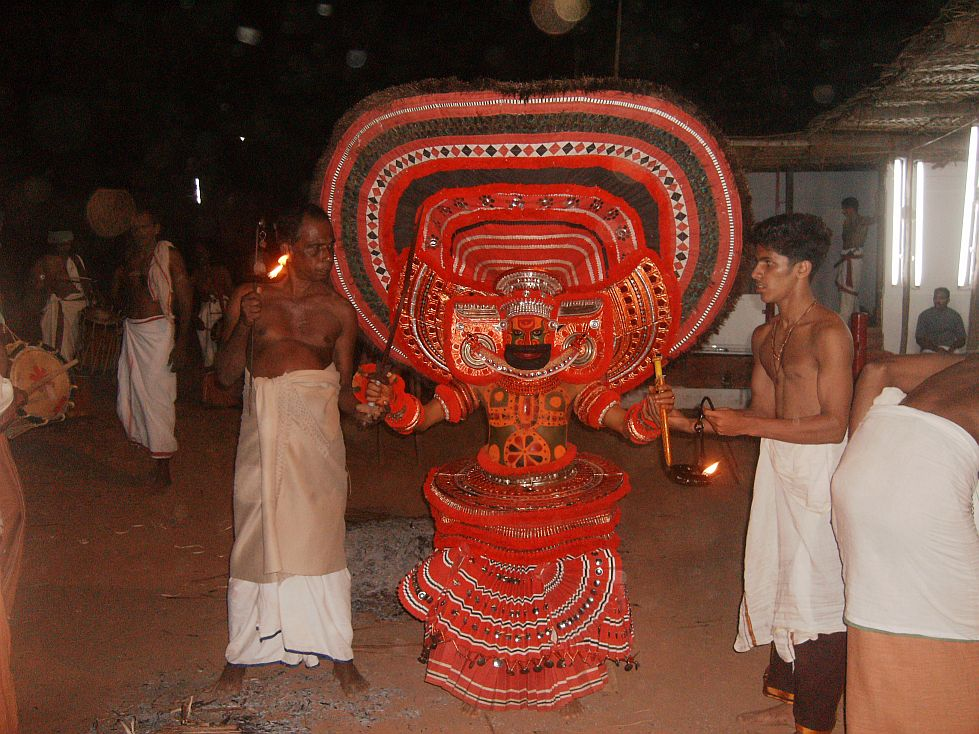 വേട്ടയ്ക്കൊരു മകന്റെ തെയ്യം,കണ്ണൂർ ജില്ലയിലെ കീഴറ കൂലോം ഭഗവതി ക്ഷേത്രത്തിൽ കെട്ടിയാടിയപ്പോൾ. കോലധാരി: ശ്രീ.ബാലകൃഷ്ണൻ പെരുവണ്ണാൻ